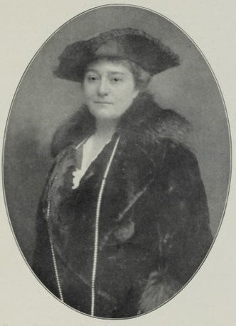 Elizabeth Leontina Salm-Reifferscheidt (1878-1939), představitelka první generace budkovské větve rodu Salm-Reifferscheidt